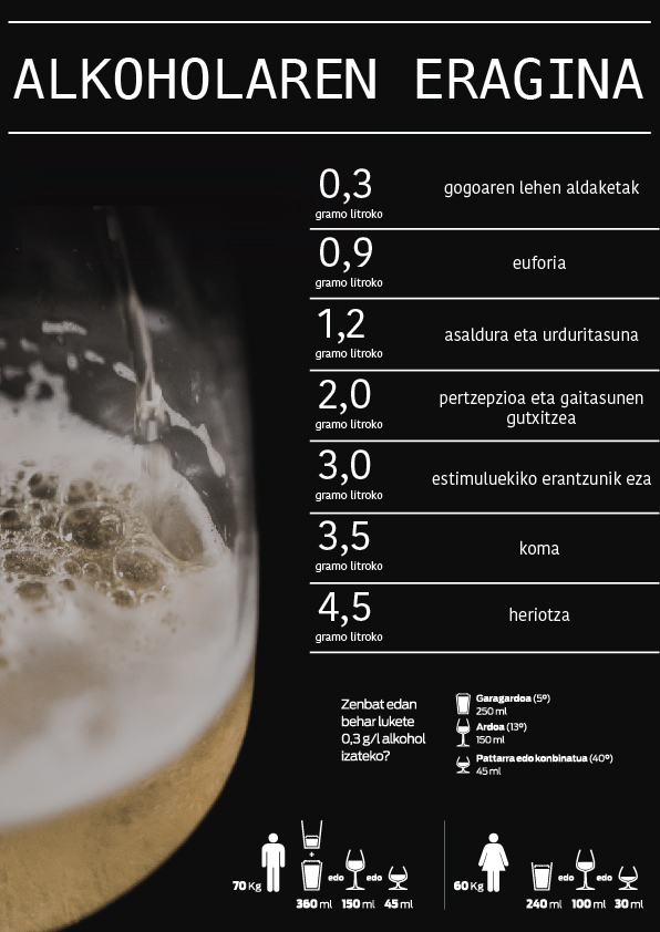 Alkoholaren eragina